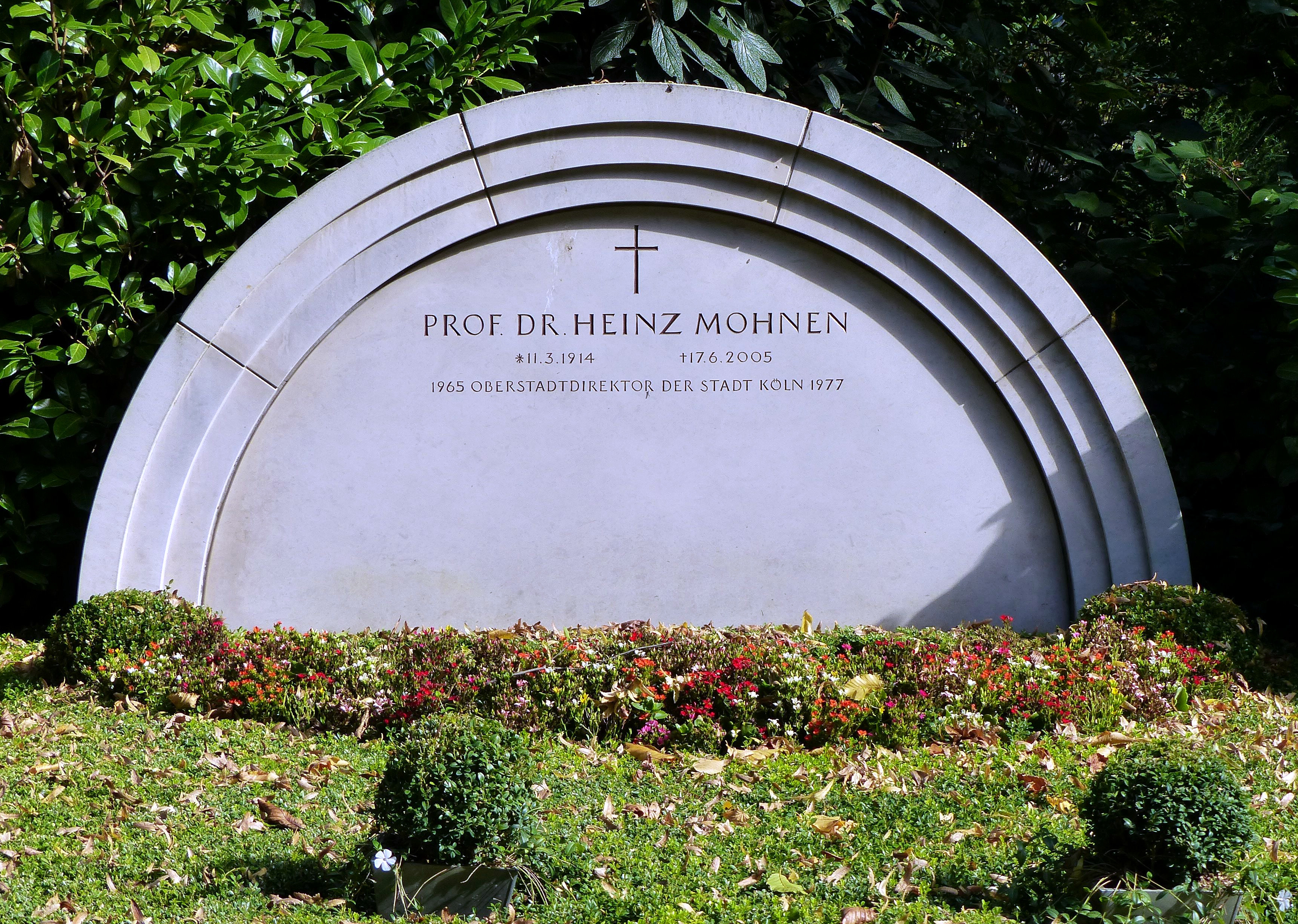 Melaten-Friedhof, Aachener Str. 204, Grabanlage Dr. Heinz MohnenThis is a photograph of an architectural monument.